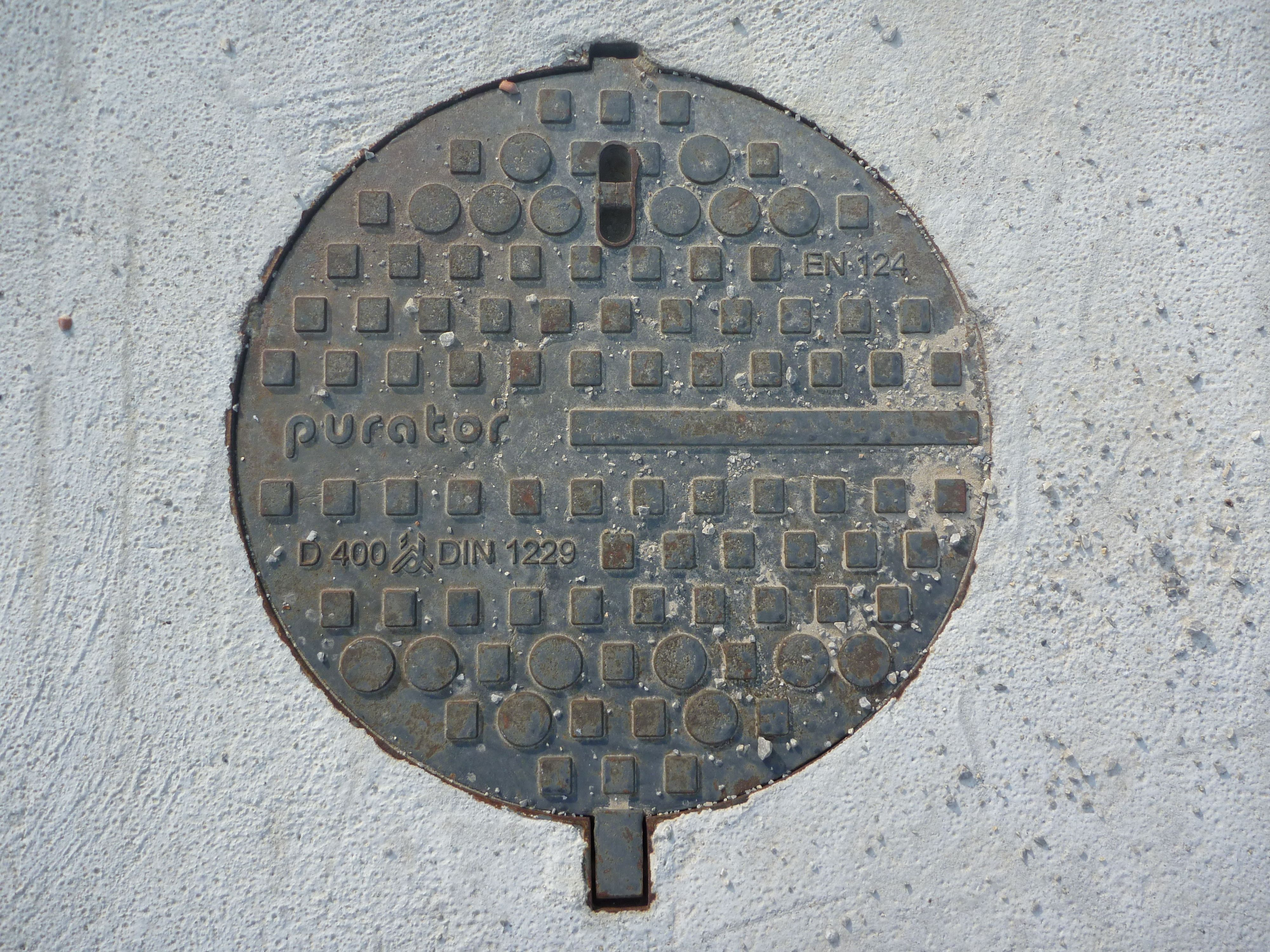 Sphärogussdeckel mit Gelenk. Purator. D-400, DIN 1229, EN 124